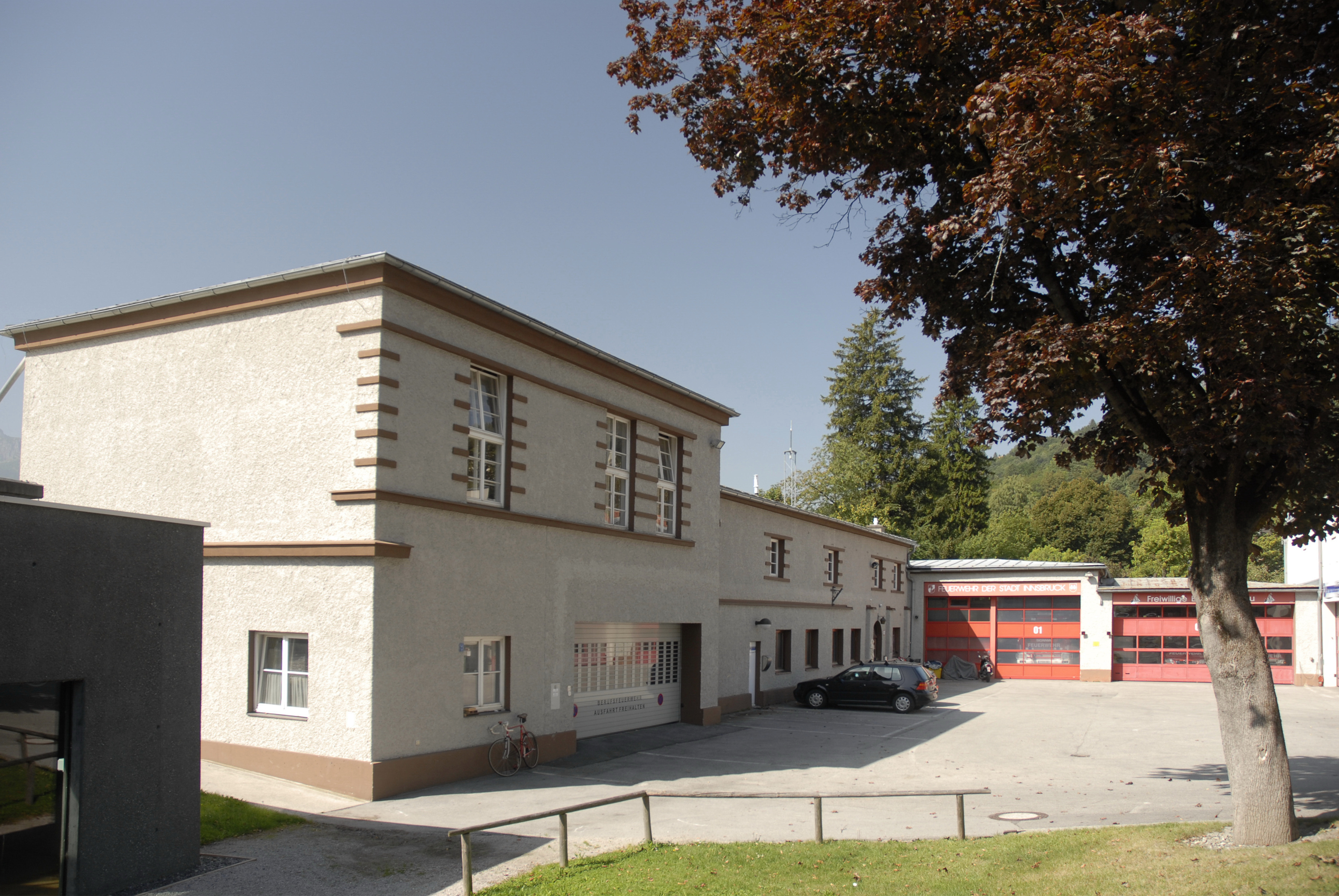 Wasser-Rettung und Feuerwehr Mühlau